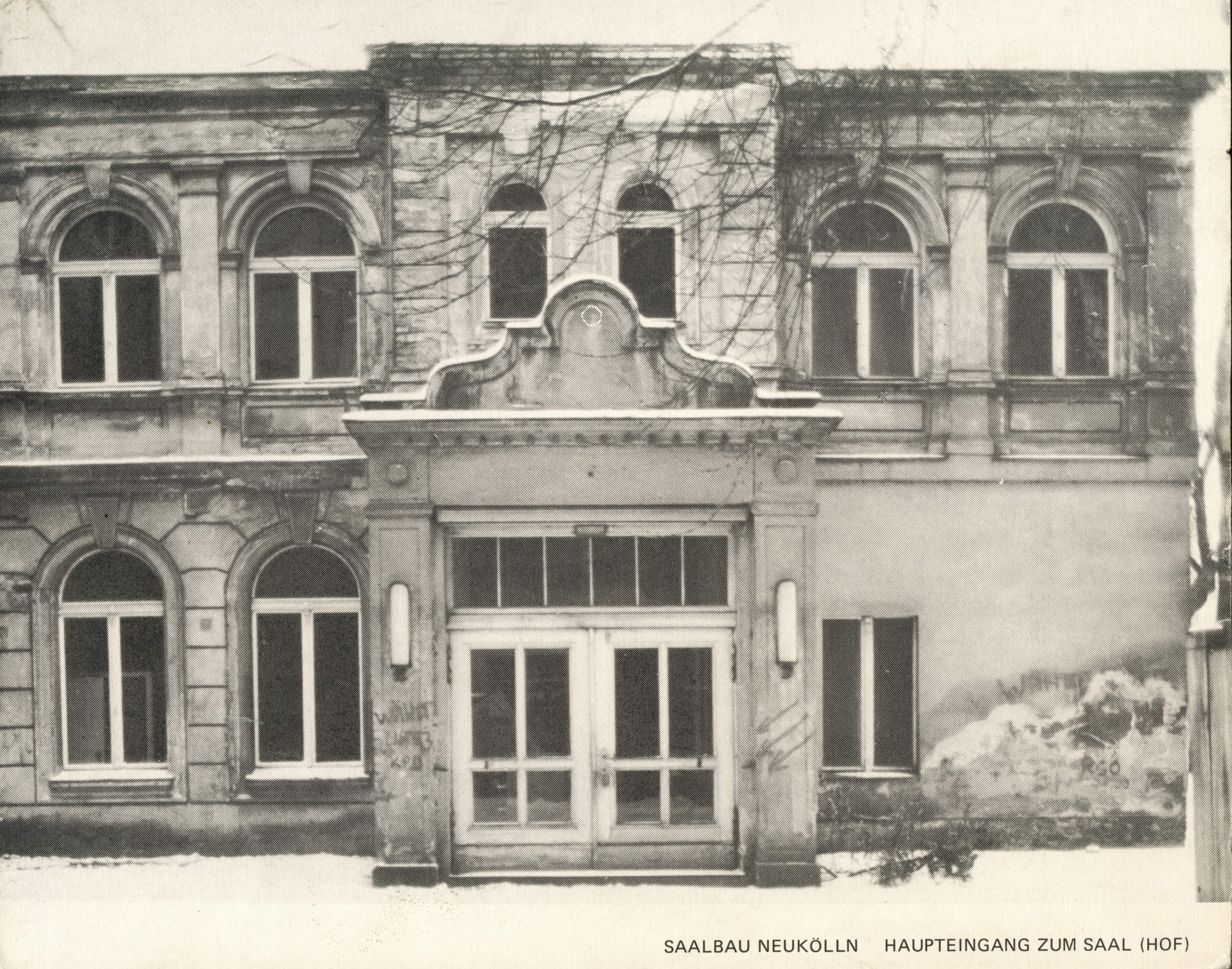 Heimathafen Neukölln Saalbau Neukölln historische Aufnahme